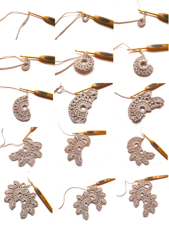 Paso a paso de filigrana a crochet